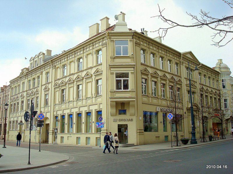 Гедимино,2